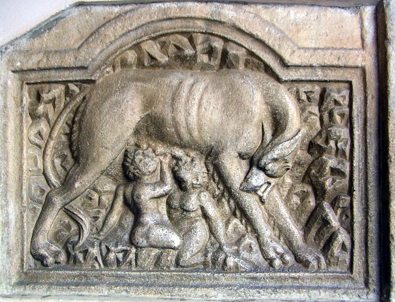 Römisches Motiv (CSIR II/4, 362) an der Marienkirche in Maria Saal